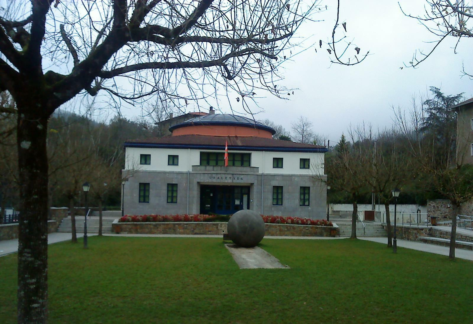 Etxebarria, Vizcaya (País Vasco, España) Casa consistorial.